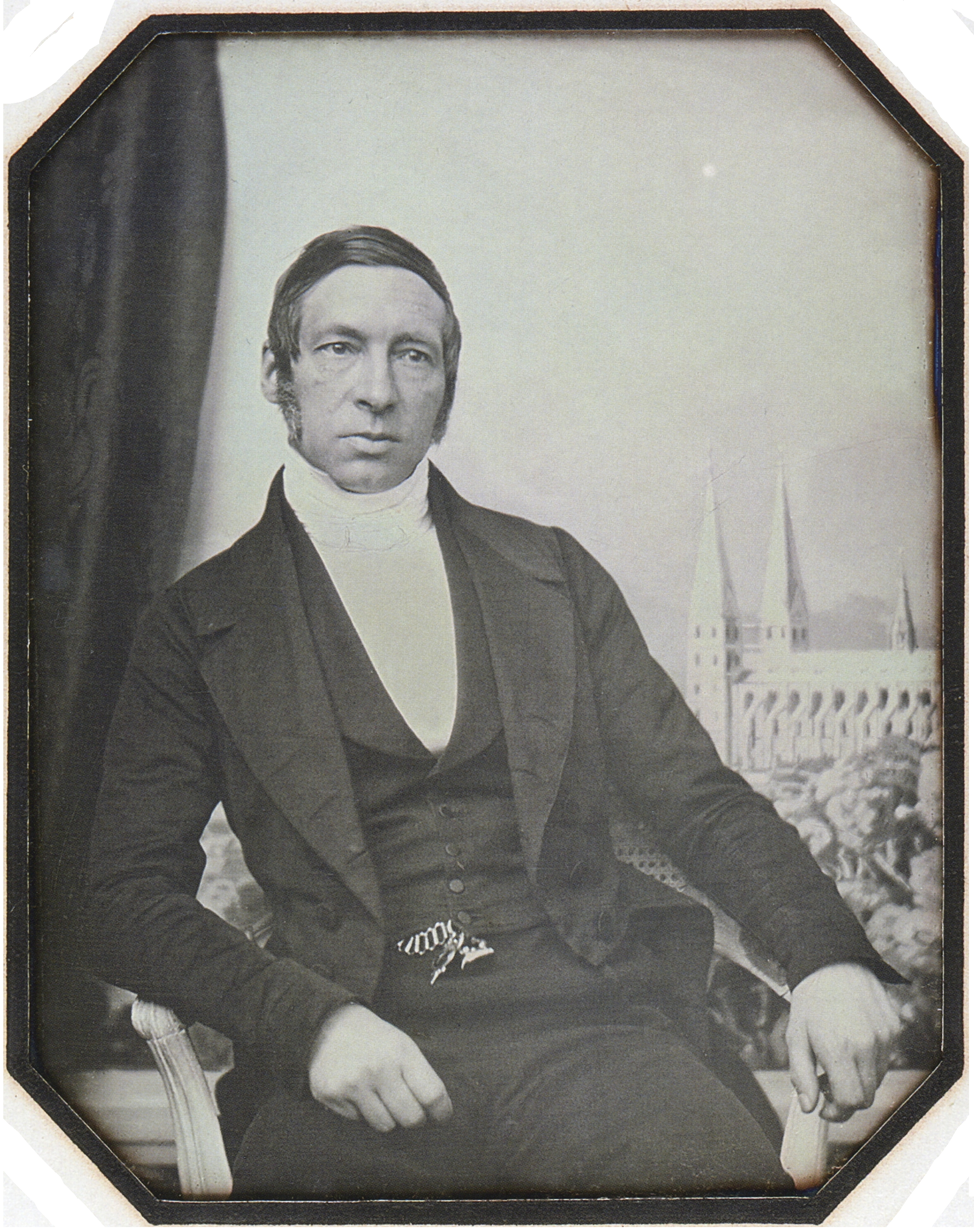 Hermann Wilhelm Hach (* 12. März 1800 in Lübeck; † 1. Dezember 1867 ebenda), deutscher Jurist und Senator der Hansestadt Lübeck. Daguerreotypie (hier seitenrichtig gespiegelt), 9 x 7 cm. Original: Archiv der Hansestadt Lübeck, FA Hach I, 15